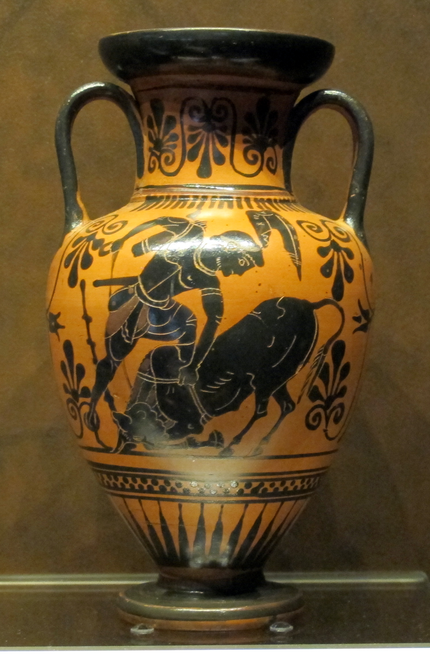 Pittore di edimburgo, anforetta attica con eracle e il toto di creta, 510 ac ca..JPG